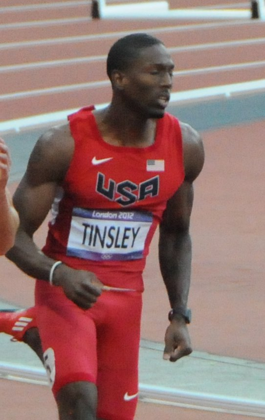 Michael Tinsley lors des Jeux olympiques de 2012.